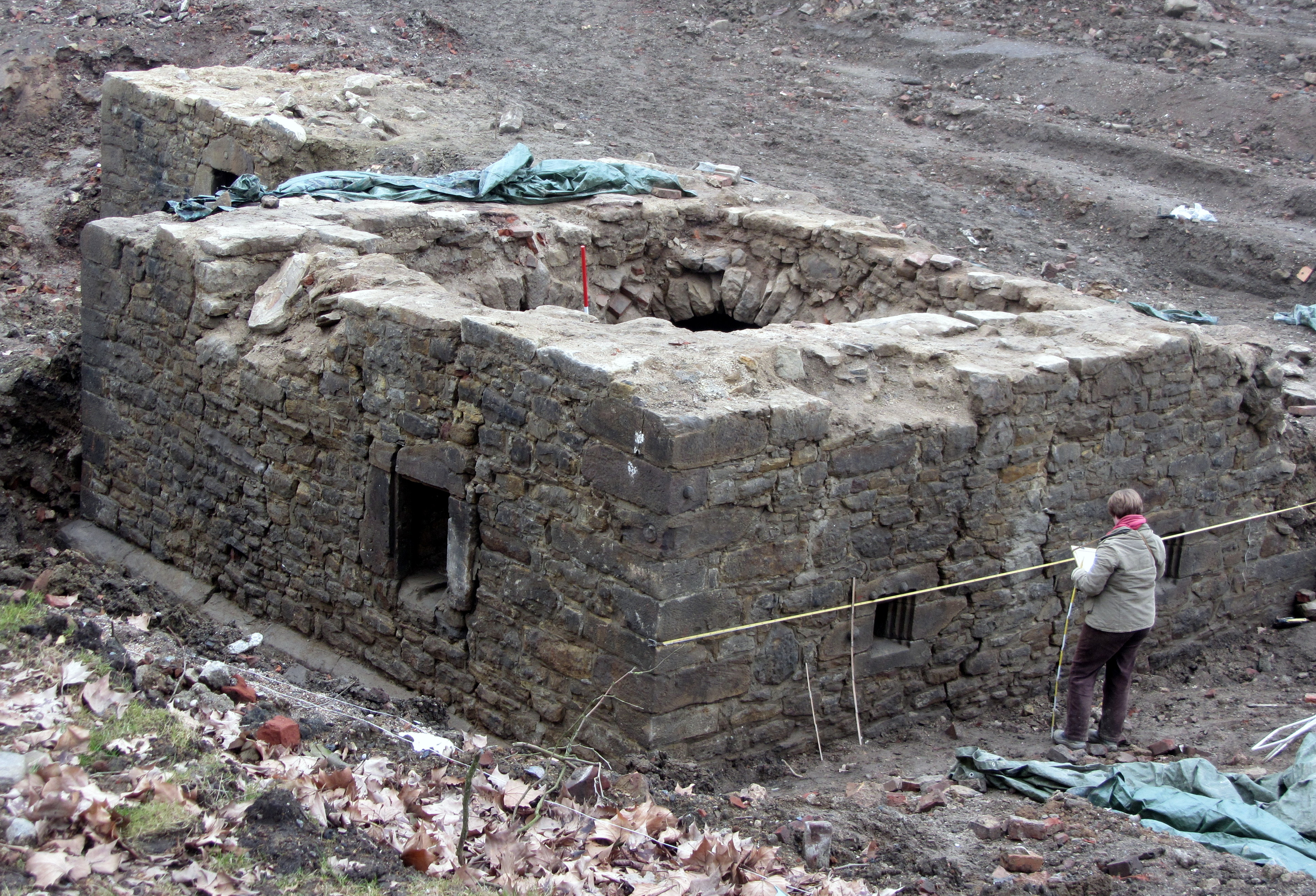 Ausgrabungen Schloss Brünninghausen, Dortmund, Ruine des Burgturms